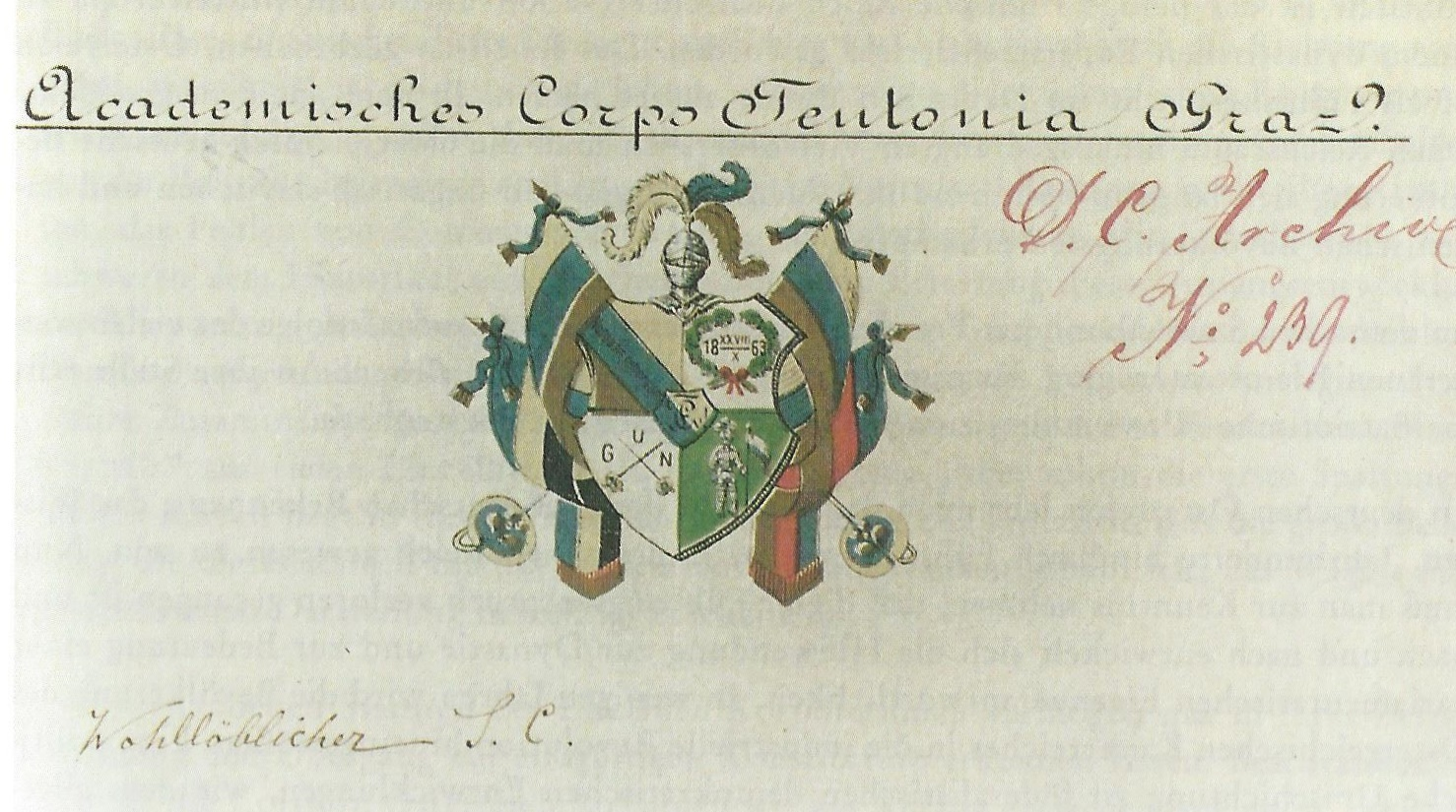 Studentenwappen des Corps Teutonia Graz, mit den von 1868 bis 1872 getragenen Farben blau-rot-gold